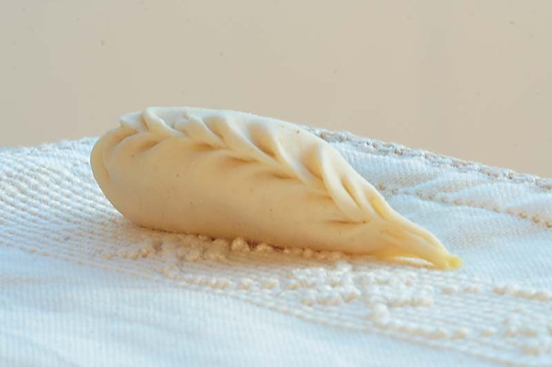 Il Culurgione, il gioiello sardo - Italia